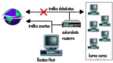 Screened Host